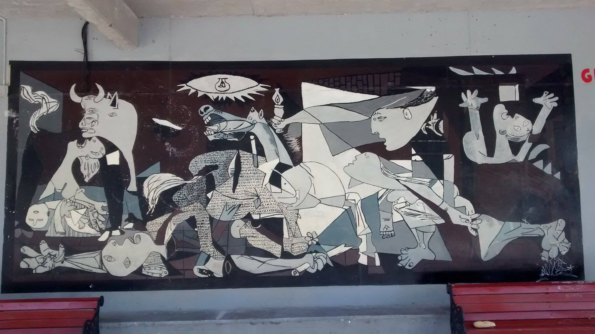 Pinturas de muralismo urbano público, en calle Carmen Covarrubias esquina Irarrázabal, en la comuna de Ñuñoa, Santiago de Chile.